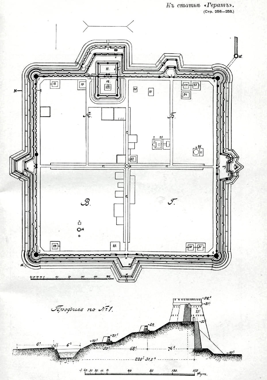 Данное фото было использовано в статье «Герат» опубликованной в седьмом томе «Военной энциклопедии», который был издан книгоиздательским товариществом И. Д. Сытина в 1912 году в столице Российской империи городе Санкт-Петербурге. К черть. для статьи «ГЕРАТ» 1) Башня (бурдж) Филь-хана. 2) Башня (бурдж) Шах-Керим-Бек. 3) Башня (бурдж) Ходжа-Абдулла. 4) Башня (бурдж) Хакистер. 5) Ворота Мекель. 6) Ворота Арк и Ноу. 7) Ворота Кутучах. 8) Ворота Ирак. 9) Ворота Хош. 10) Ворота Кандагар. 11) Новая цитадель (Арк-и-Ноу). 12) Старая цитадель (Арк). 13) Дом коменданта (Супех-Саляра). 14) Водохранилище (ибамбар) Чар-су. 15) Впуск воды во рвы и ограду (кярыз). 16) Выпуск воды из ограды. 17) Крытые базары. 18 и 19) Казармы. 22 и 23) Казармы. 29—31) Казармы. 20) Склад пороха и снарядов. 21) Склад оружия. 24) Войсковой склад провизии. 25) Эндерун. Дворец Найбуль-Саляри. 26) Городская мечеть Джума. 27) Караван-сарай Хаджей. 28) Новый калших Гаратп. А. Квартал Бер-дурани. Б. Квартал Кутучах. В. Квартал Махмаид (Хакистер). Г. Квартал Хаджа-Абдулла-Миср.